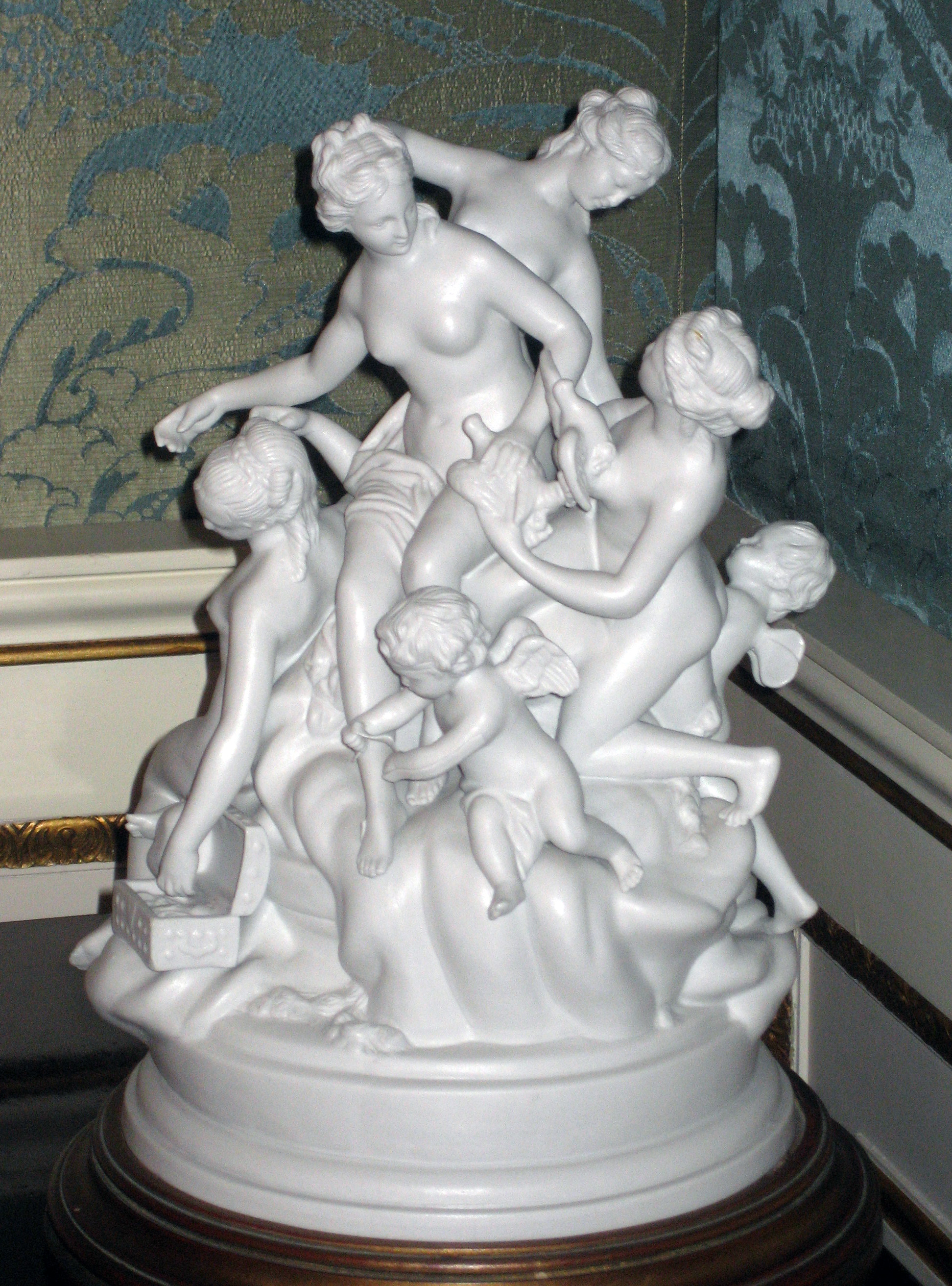 Ceràmica d'Alcora al Despatx Oficial (Palauet Albéniz)